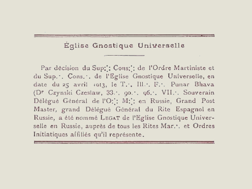 "Согласно решению Верховного Совета Ордена мартинистов и Верховного Совета Гностической Католической церкви, 25 апреля 1913 года Высокопросвещенный Брат Пунар Бхава (Чинский Чеслав, 33.’. 90.’. 96.’. VII.’.), Державный генеральный представитель Ордена мартинистов в России, Великий Смотритель и великий Генеральный представитель Испанского устава в России, назначается Посланником Гностической Католической церкви в России и представителем Мартинистского устава и родственных последнему посвятительных орденов."